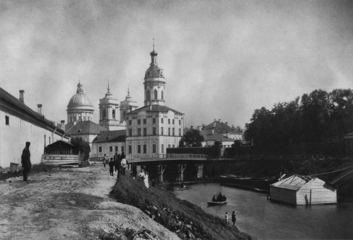 Александро-Невская лавра. Вид на Троицкий собор и Феодоровский корпус с Экономским мостом через реку Монастырку, 1880-е отпечаток на альбуминовой бумаге